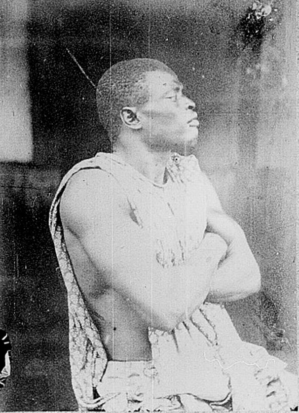 "Ouali : 21 ans, tirailleur du poste de Boké, nation Sérère" (photo extraite de 50 dessins de E. Noirot en 1881 et 35 phot. de la même époque, voyages du docteur Jean-Marie Bayol au Sénégal, au Soudan et dans la Haute-Guinée (Fouta-Djallon)